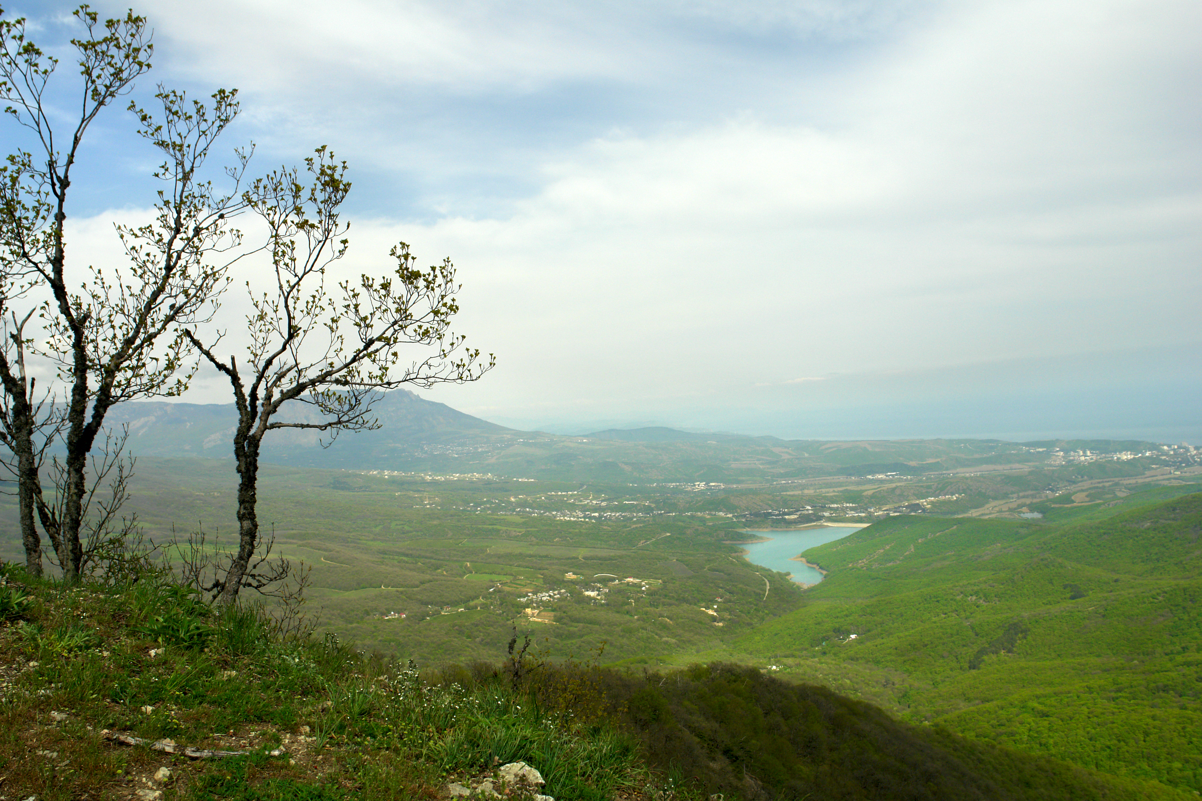 с. Ізобільне (Алуштинська міськрада)